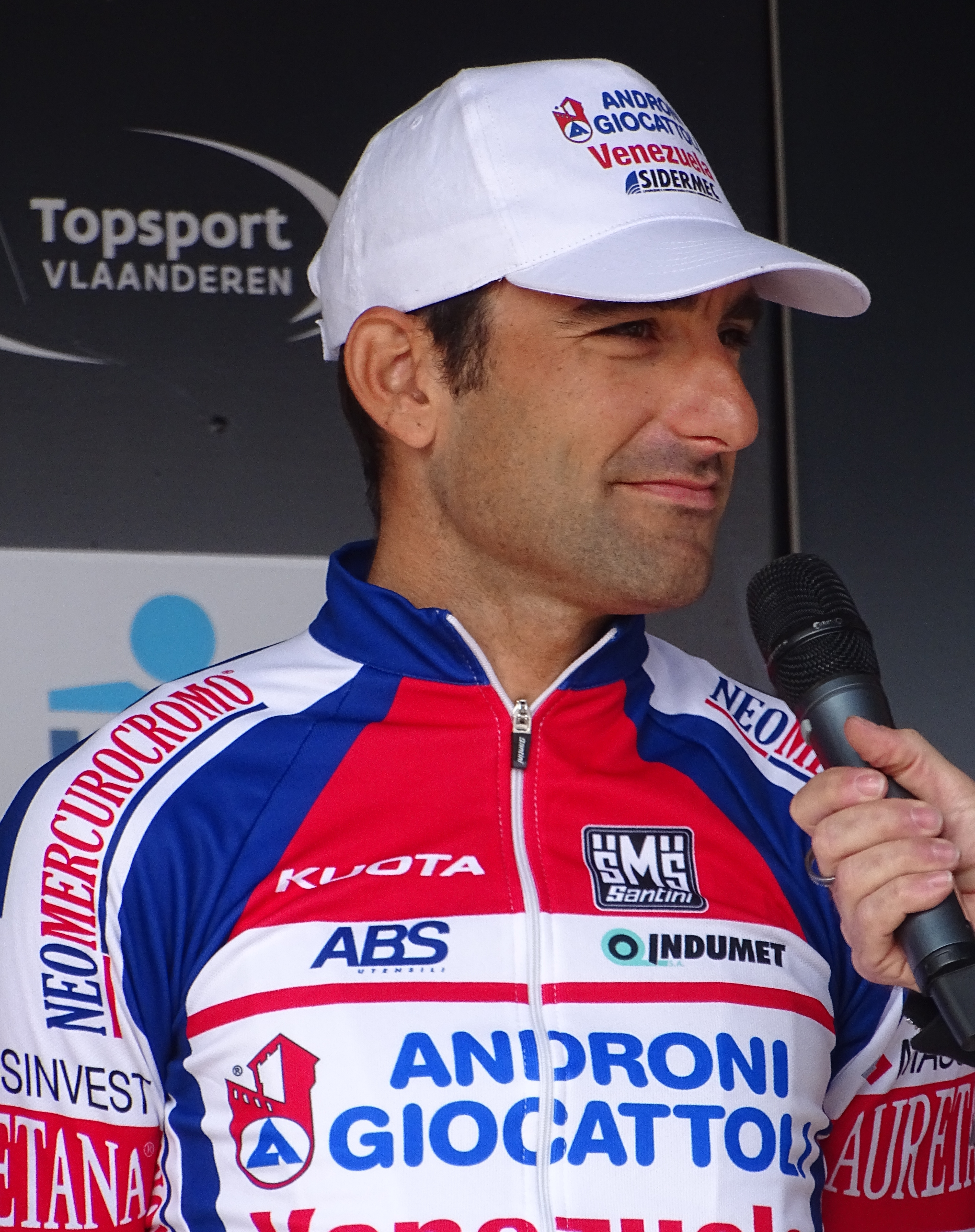 Reportage réalisé le mercredi 8 avril à l'occasion du départ du Grand Prix de l'Escaut 2015 à Anvers, Belgique.